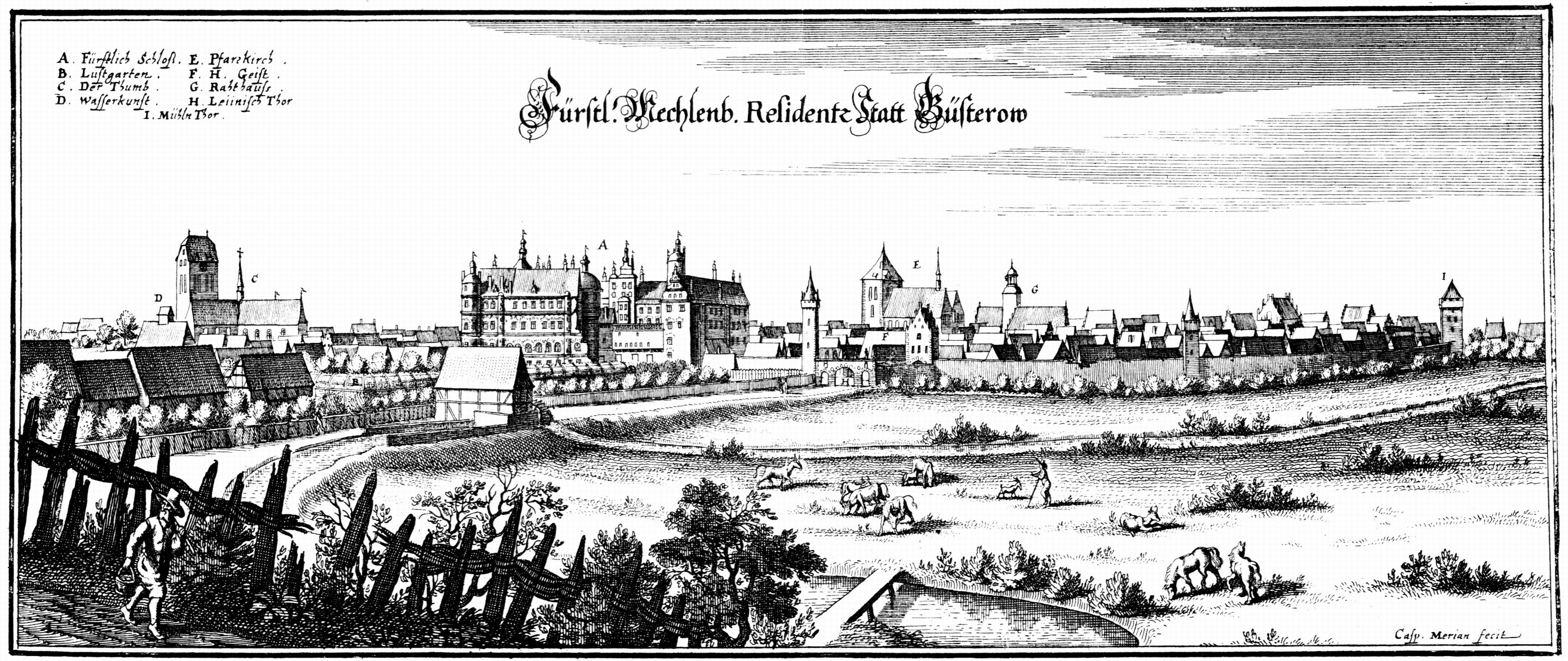 Güstrow. - Gesamtansicht, Historische Ortsansicht.